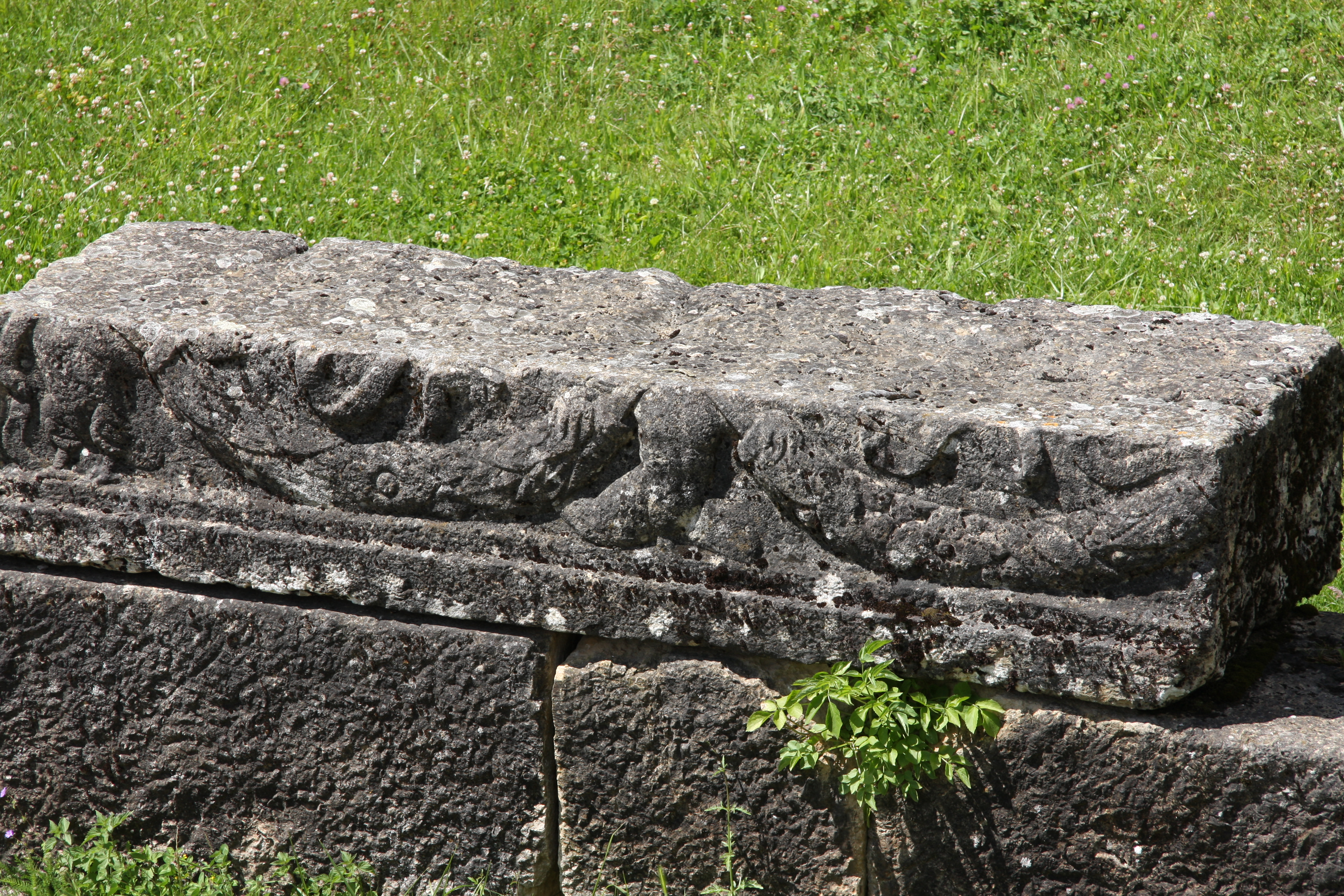 Détail d'un vestige du mausolée gallo-romain de Lanuéjols en Lozère (France)